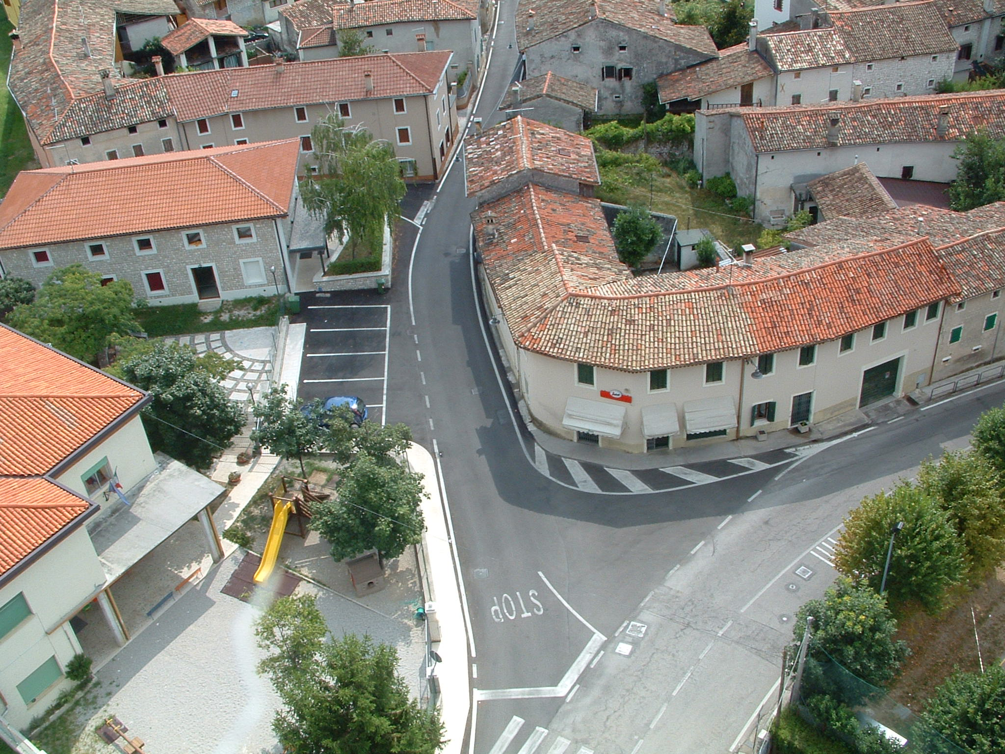 Centro di Dardago visto dalla cima del campanile (50m.)